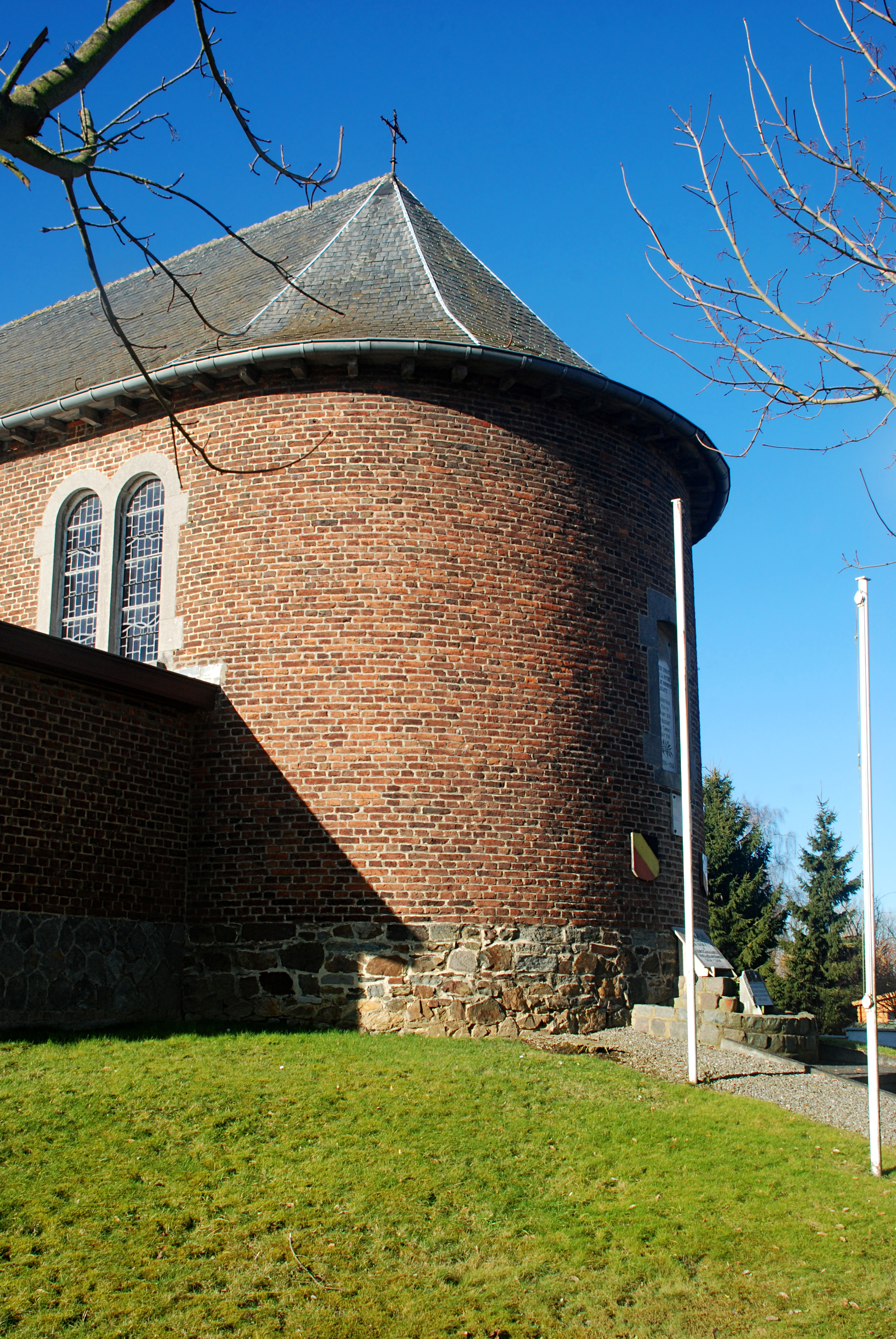 Belgique - Brabant wallon - Chastre - Cortil-Noirmont - Église Saint-Pierre de Noirmont